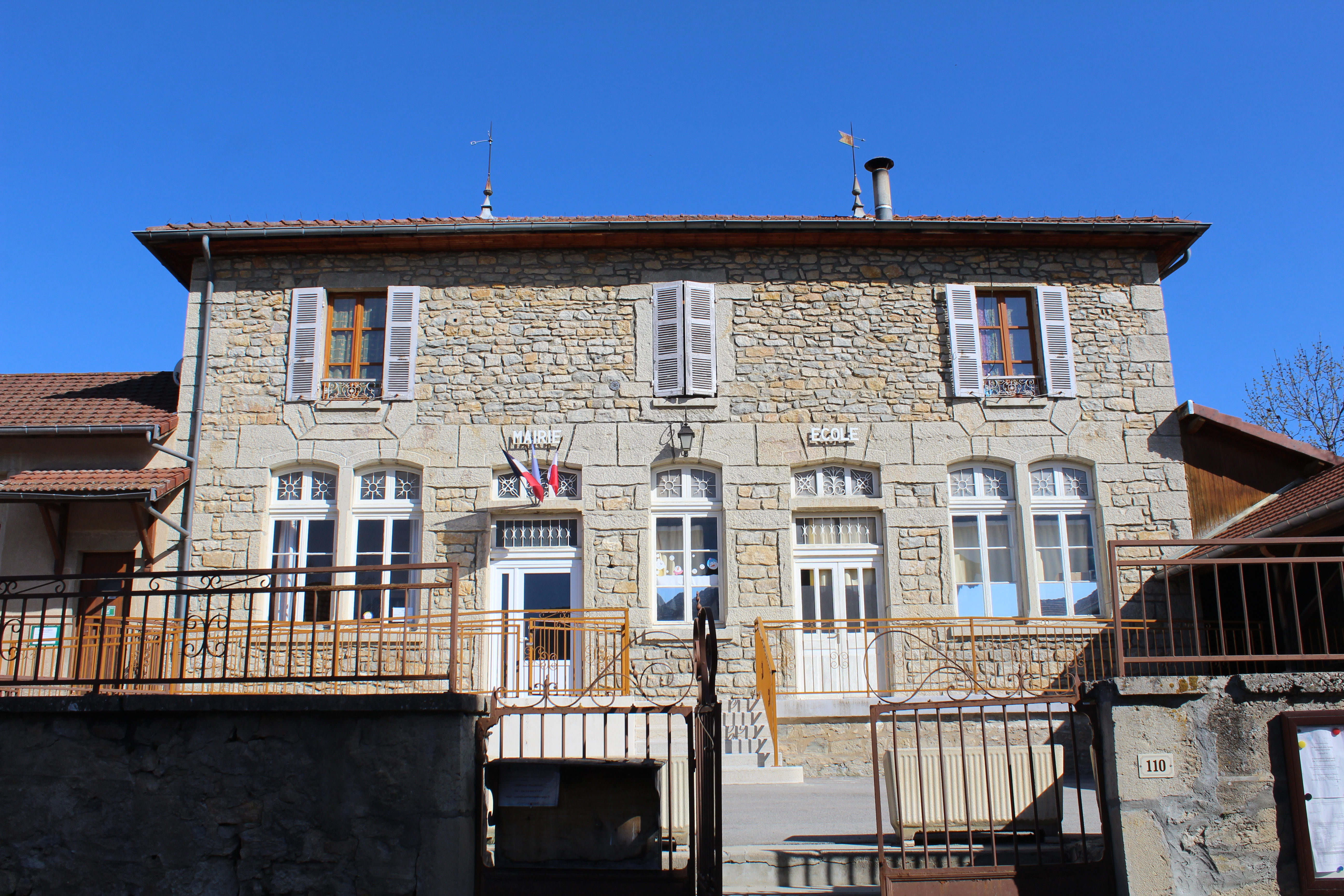 Mairie de Lompnas.